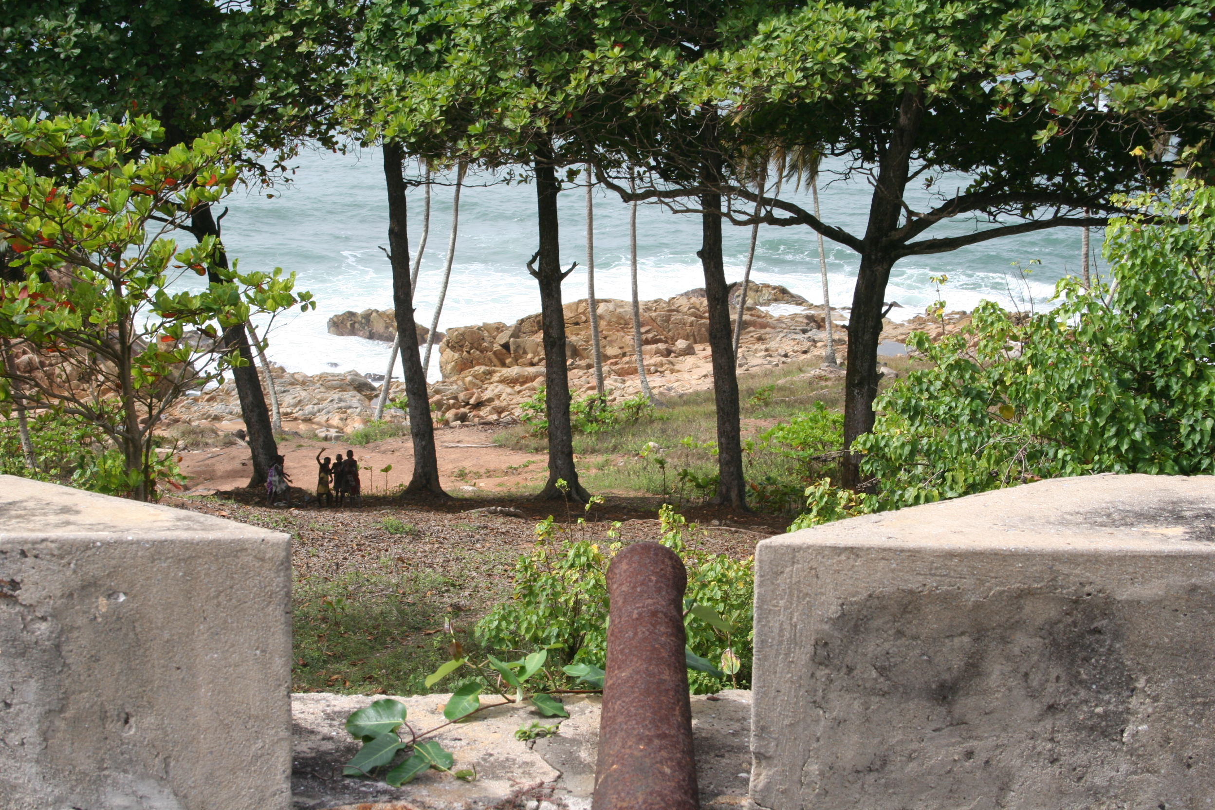 Blick vom Fort Groß Friedrichsburg (Ghana) auf die Bucht